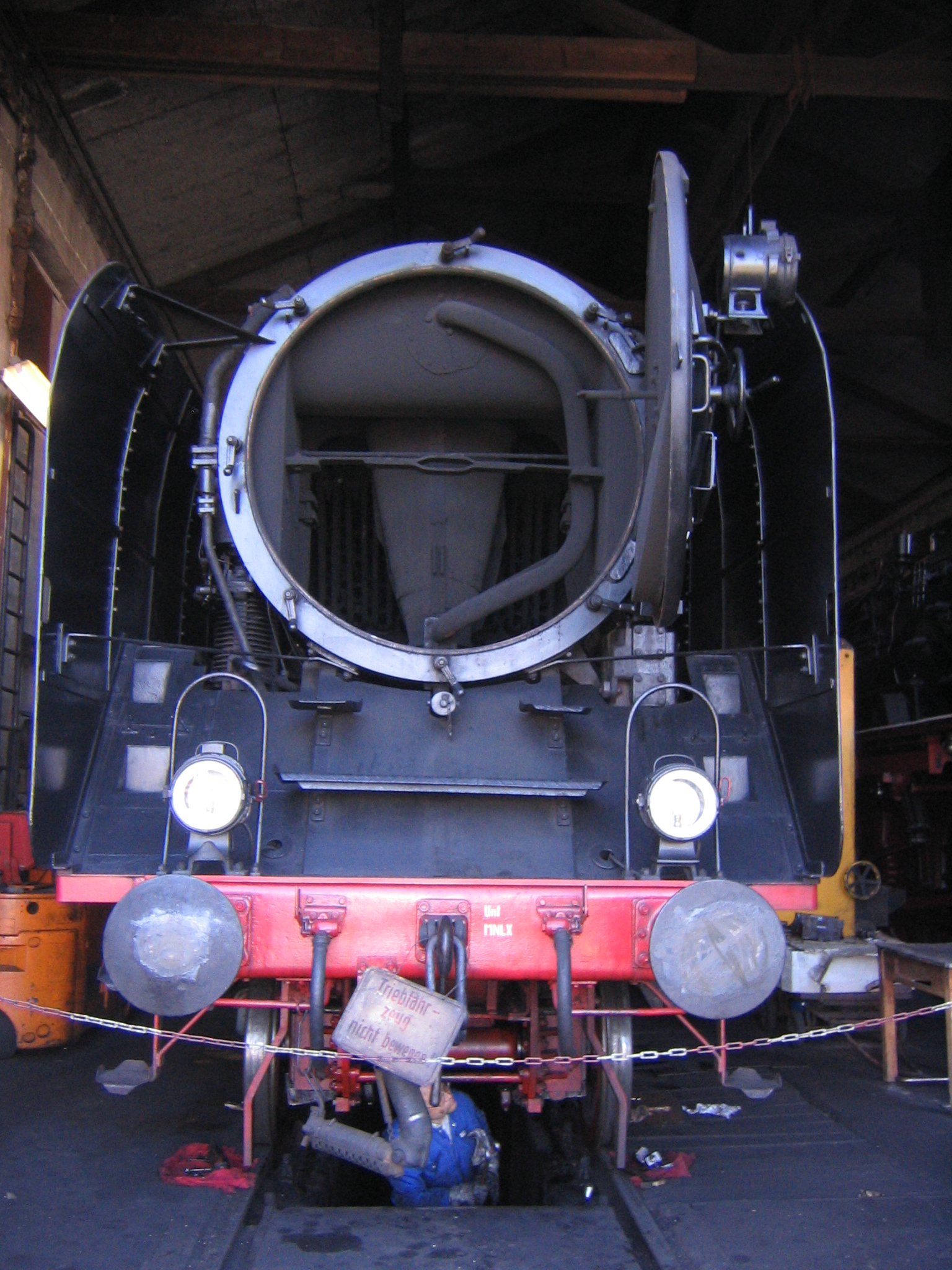 Schnellzuglokomotive 01 066 im Lokschuppen des Bayerischen Eisenbahnmuseums Nördlingen